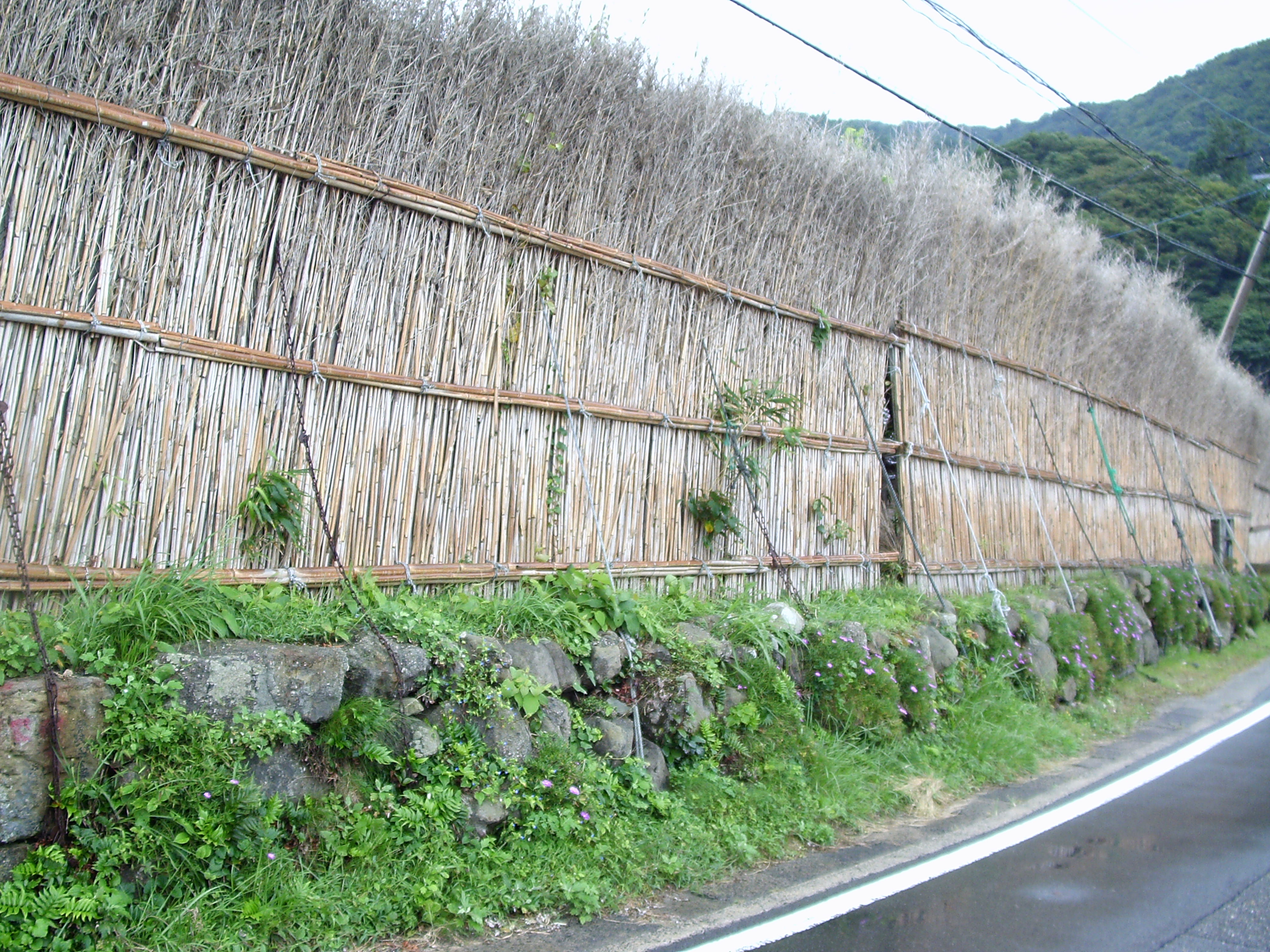 重要文化的景観「大沢・上大沢の間垣集落景観」ー大沢地区